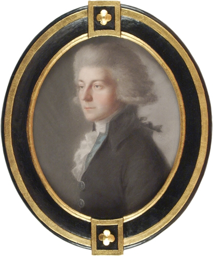 Depicted person: Friedrich Fleischmann